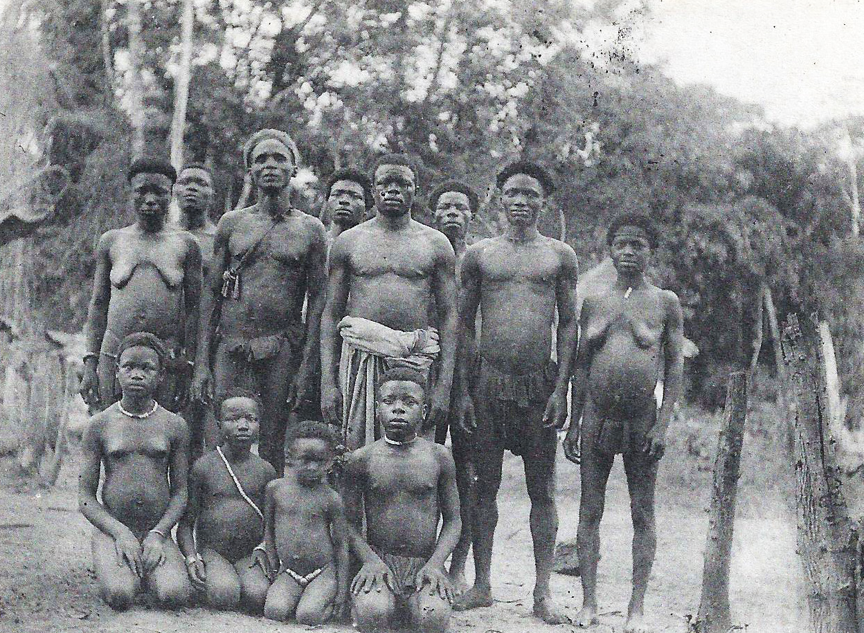 Chef Turumbu et sa famille. Congo. [carte postale recadrée] sans mention d'auteur, d'éditeur ou de date.